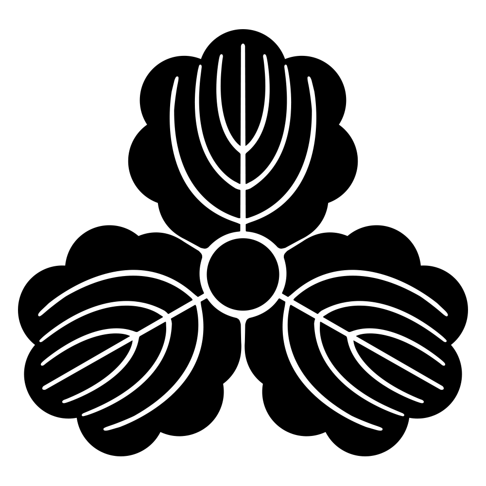 150以上前のもので著作権なし